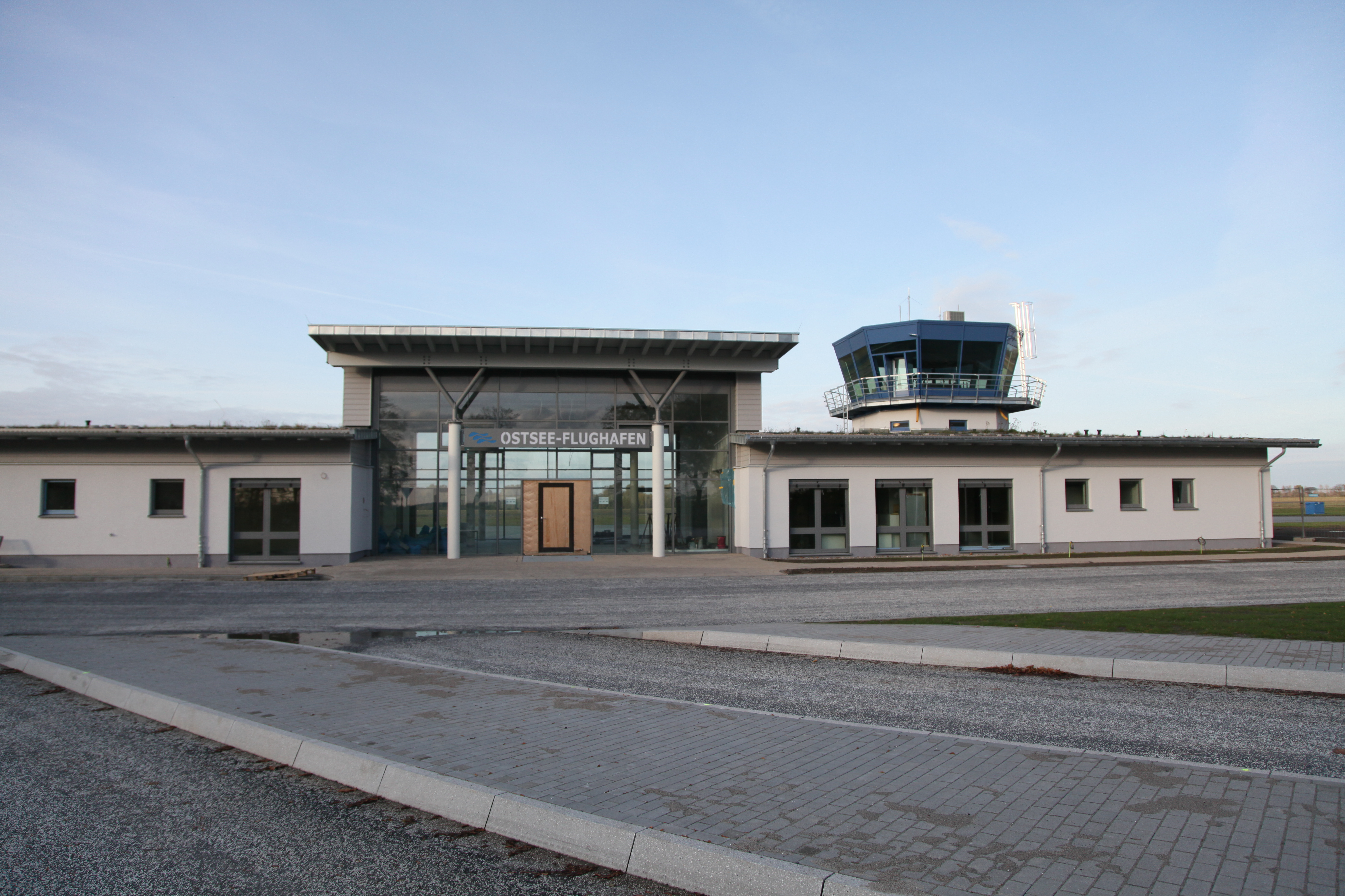 Neubau der Abflughalle des Flughafens Barth